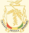 Stemma Guinea